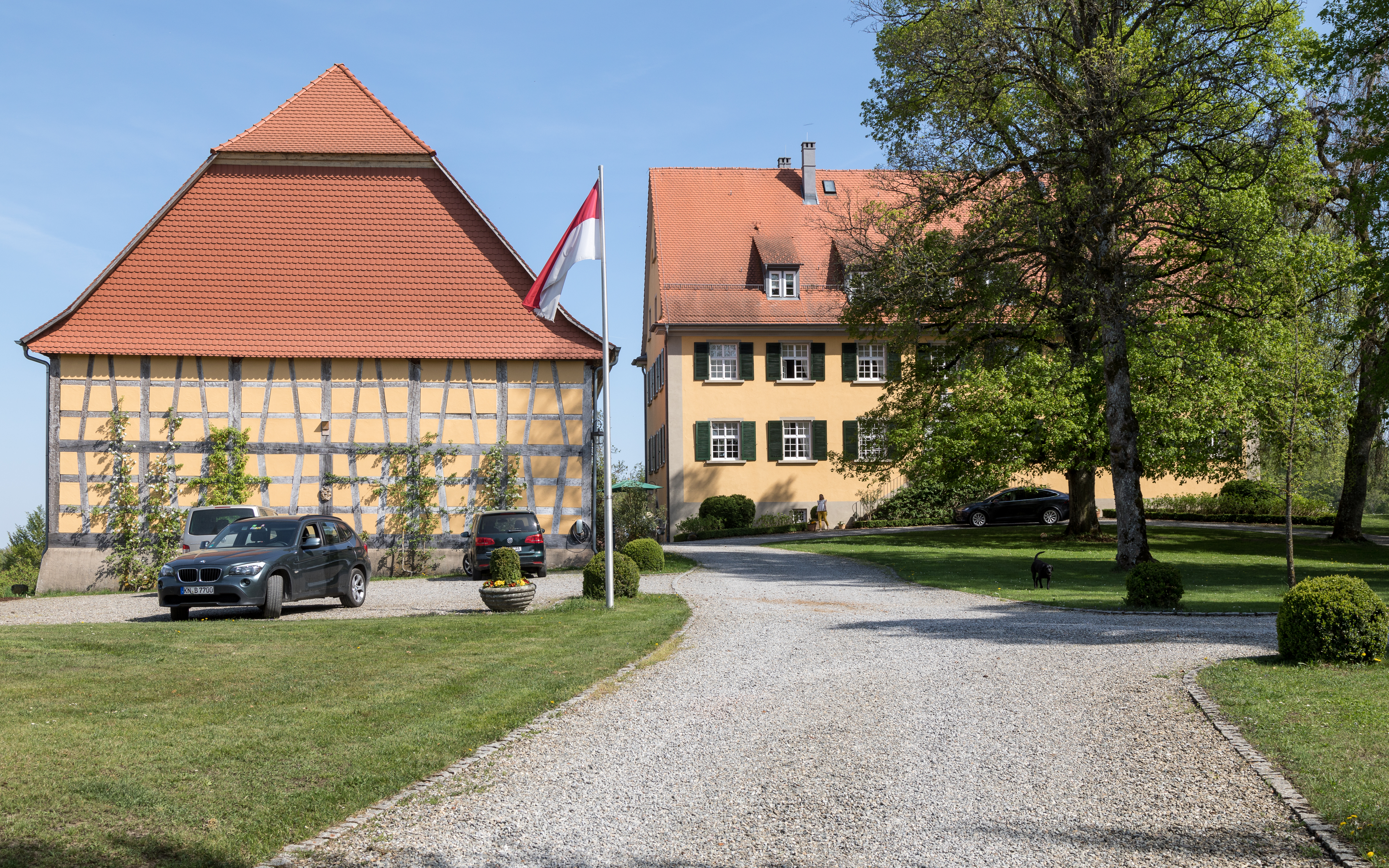 Schloss Langenrain (Allensbach) - Westseite